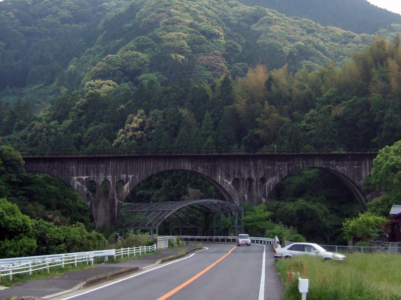 松浦鉄道福井川橋梁（Matsuura Railway Fukuigawa Bridge）